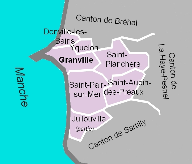 Carte du canton de Granville en 2012.